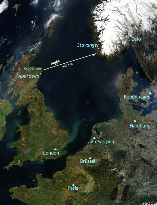 Flugstrecke der ersten Nordseeüberquerung von Tryggve Gran am 30. Juli 1914 Date of original NASA source photo - 16 April 2003 A Version without Sahara dust and fire: left|thumb|100px